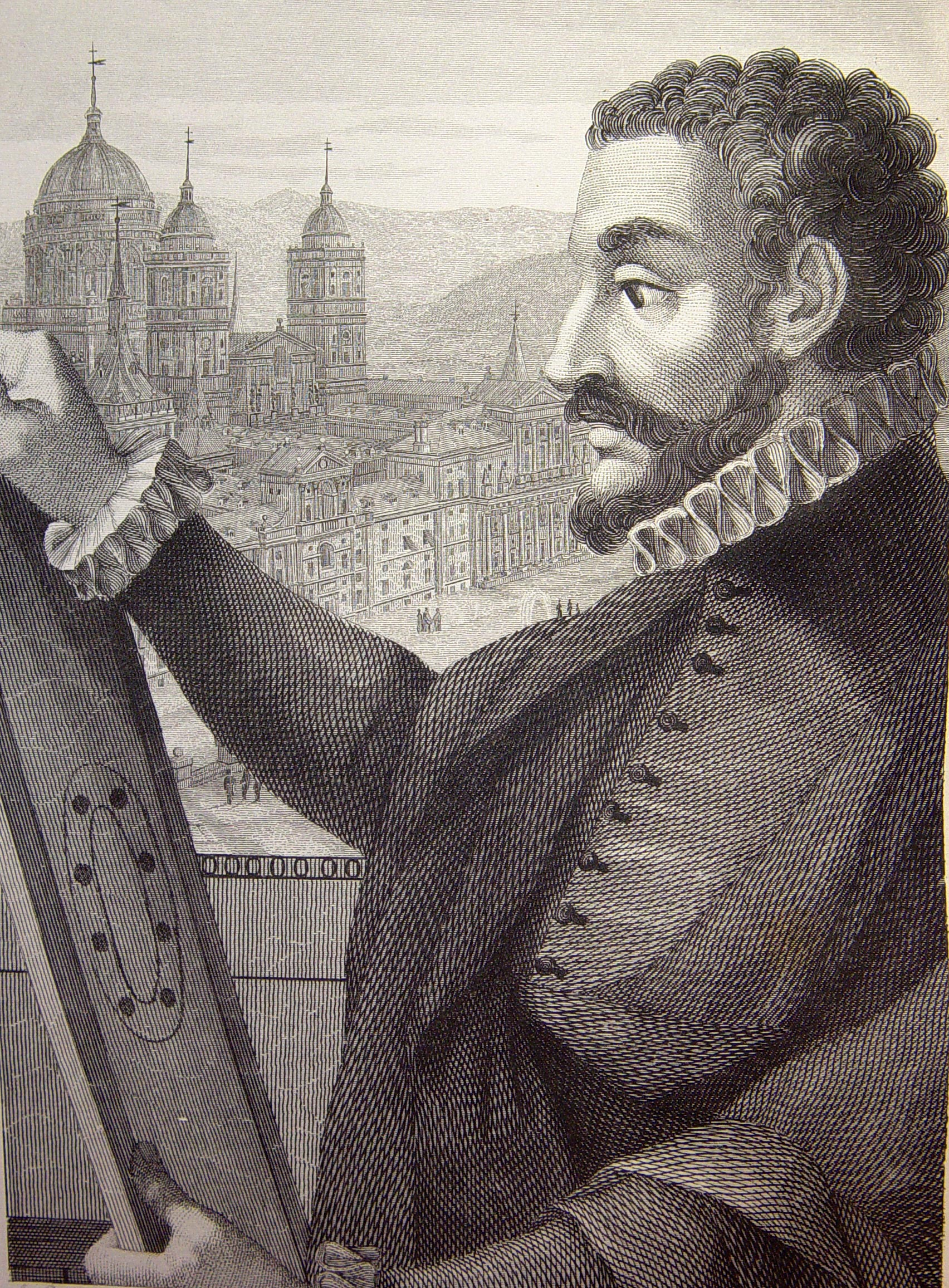 Ilustraciones pertenecientes al libro: Las glorias nacionales : grande historia universal de todos los reinos, provincias, islas y colonias de la Monarquía Española, desde los tiempos primitivos hasta el año de 1852. - Madrid [etc.] (Barcelona : Imprenta de Luis Tasso) Librería de la Publicidad [etc.], 1852-1854.